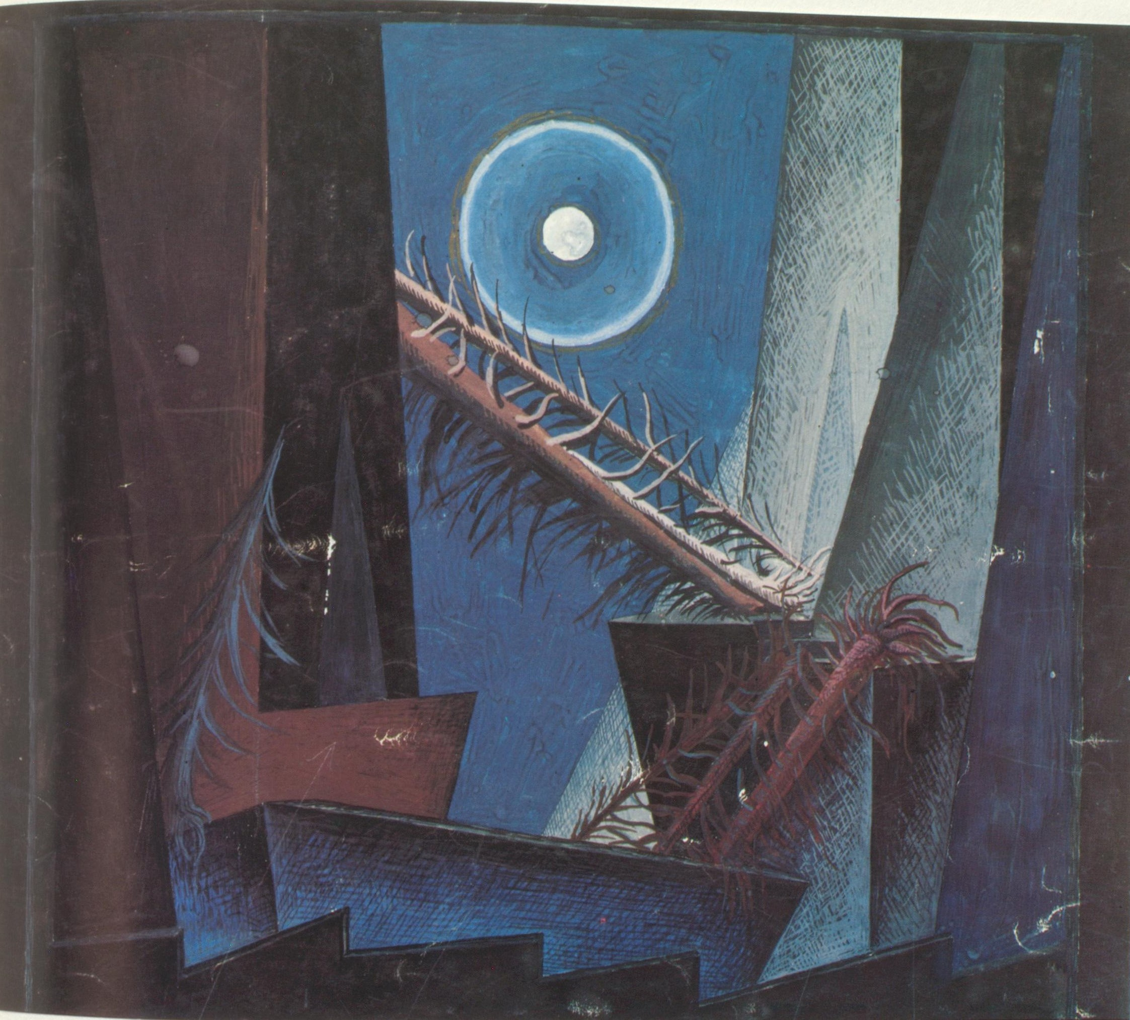 Ewald Dülberg Bühnenbildentwurf zu Der Freischütz Wolfsschlucht Krolloper 1928